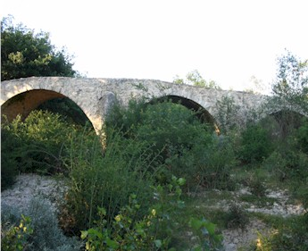 photo perso concernant la commune de Vacquières (Hérault, France)